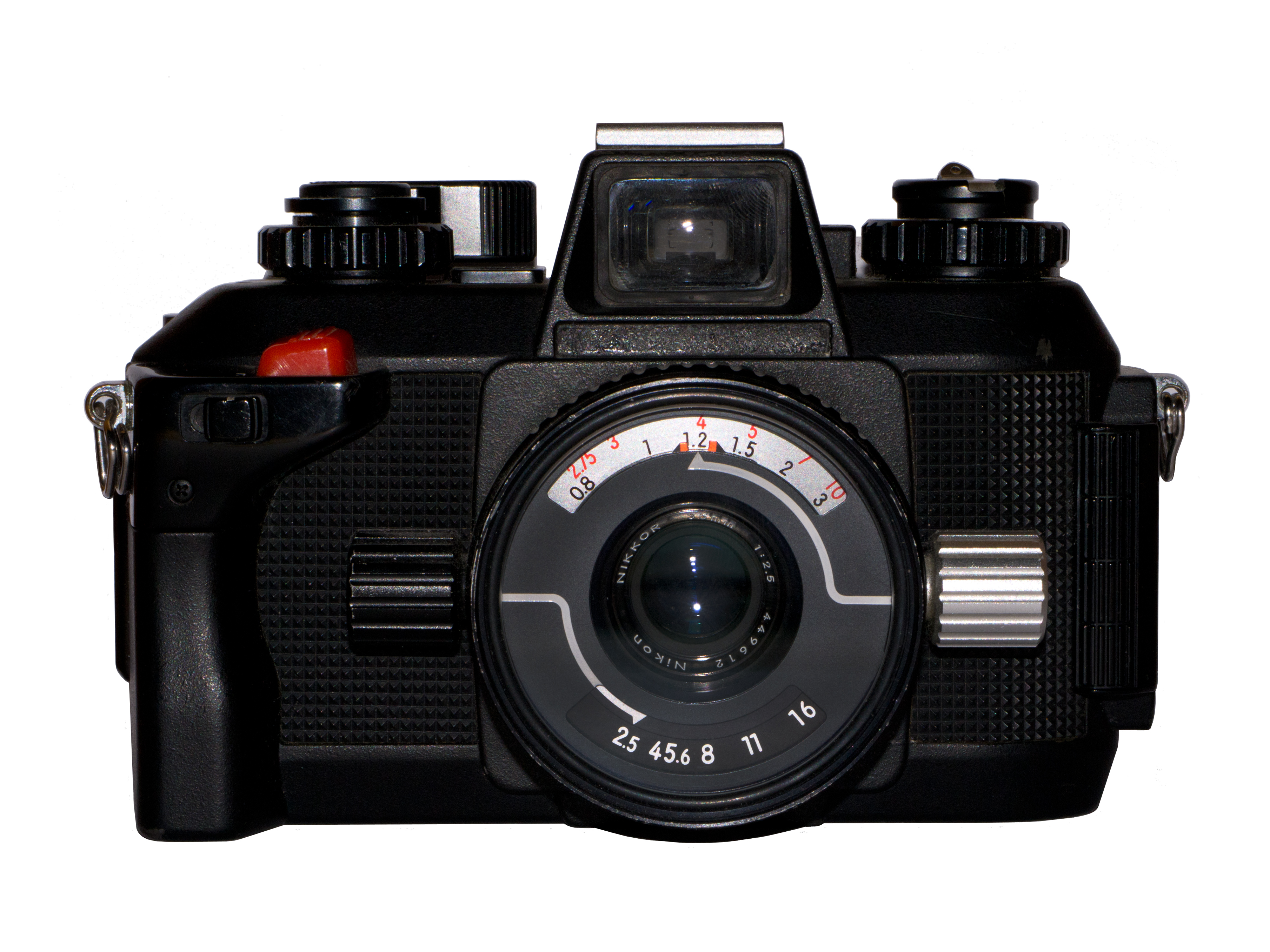 Nikonos IVa with 2.5/35mm lens